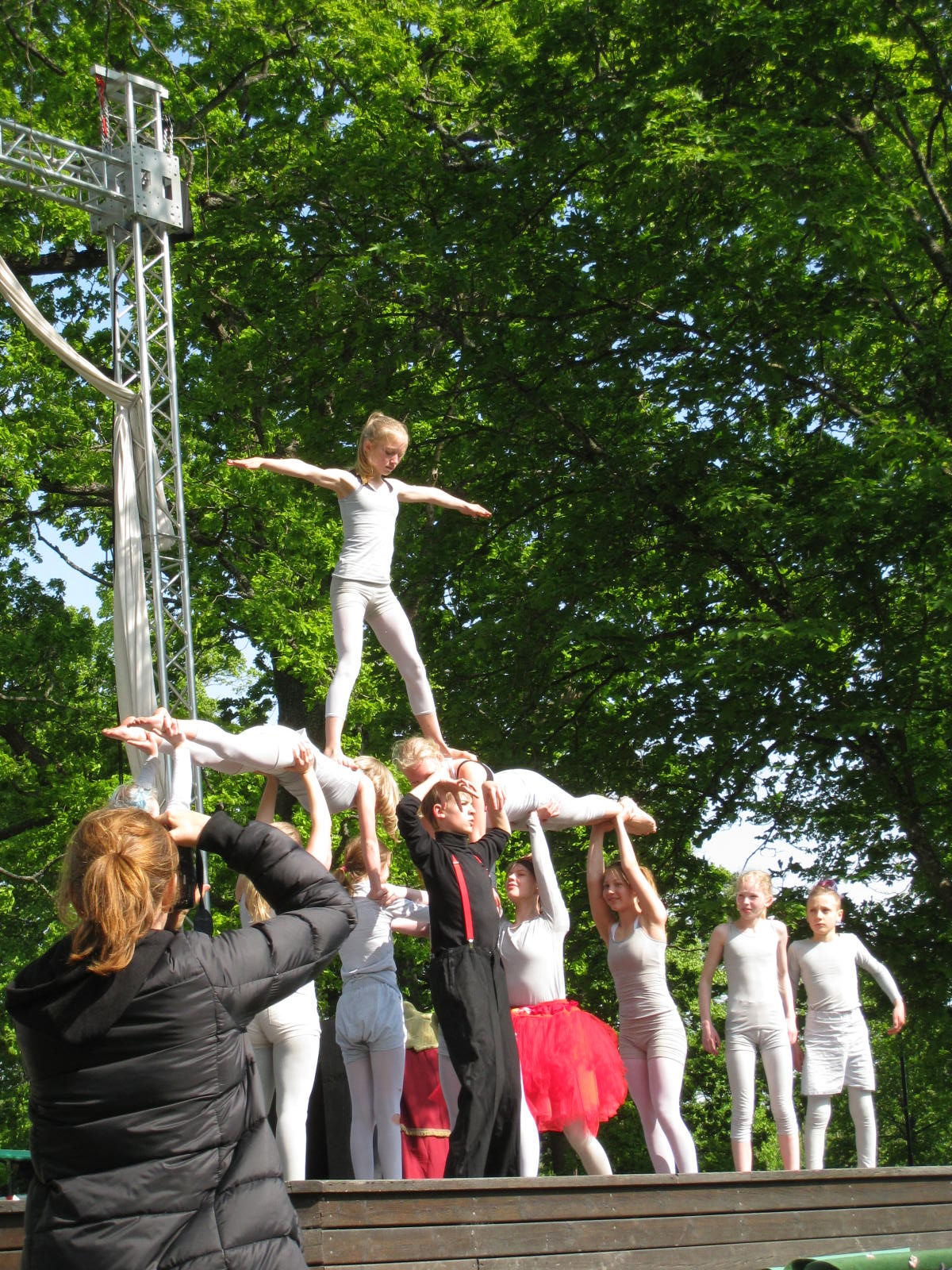 Görvälndagen är en hembygdsdag som arrangeras årligen av Järfälla hembygdsförening och Järfälla kommun tillsammans vid Görvälns slott i Järfälla kommun.